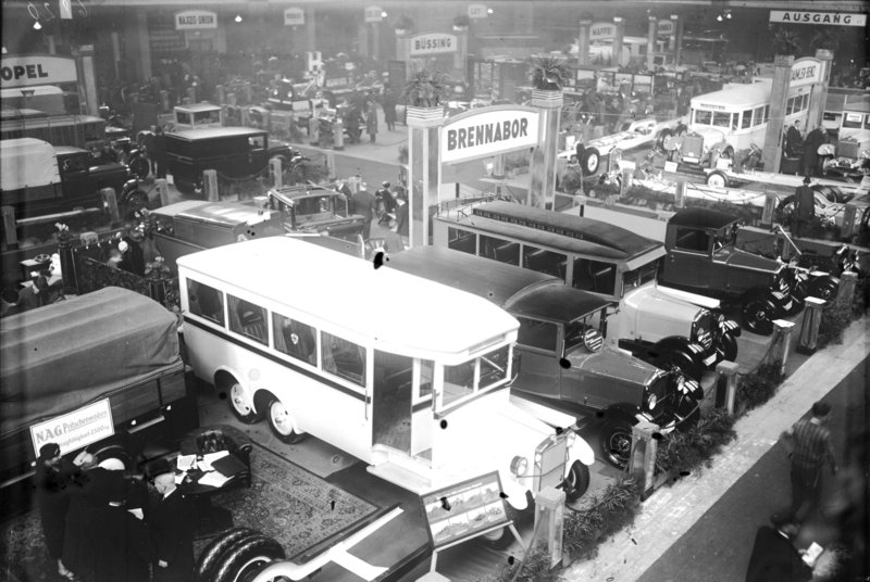 Die Eröffnung der Internationalen Automobilausstellung in den Ausstellungshallen am Kaiserdamm in Berlin! Blick auf den Brennaberstand für Personen-, Kraft- und Lieferwagen.